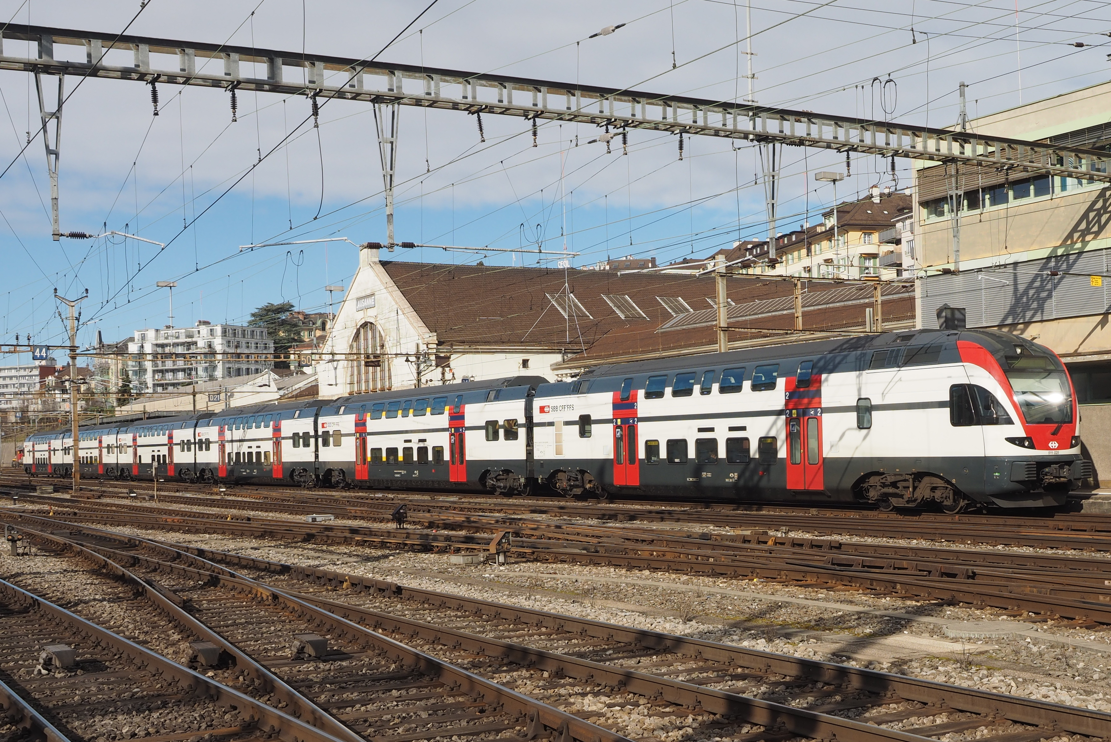 L'ancienne halle CFF aux locomotives, du côté ouest de la Gare de Lausanne.